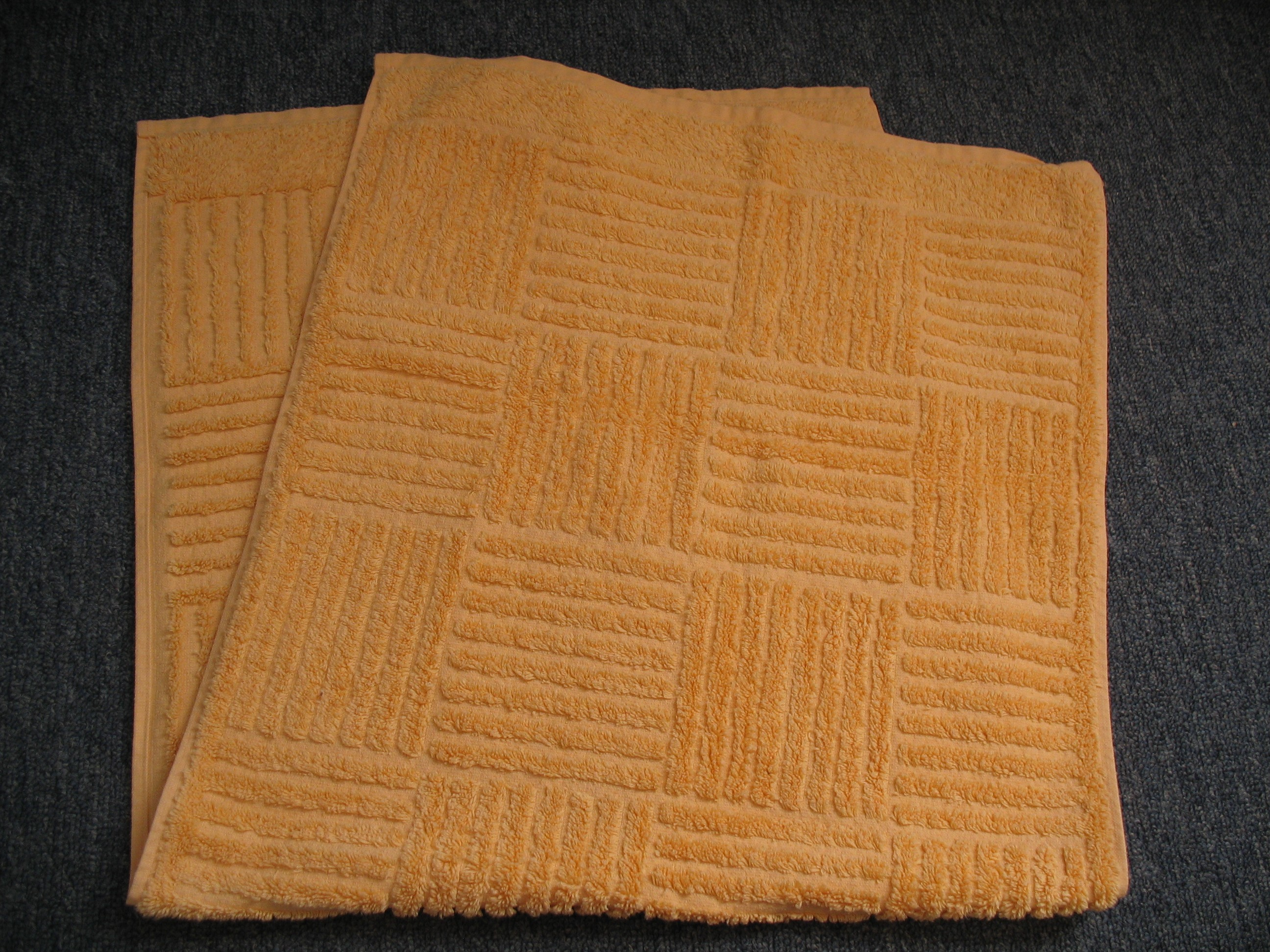 Frottee-Handtuch